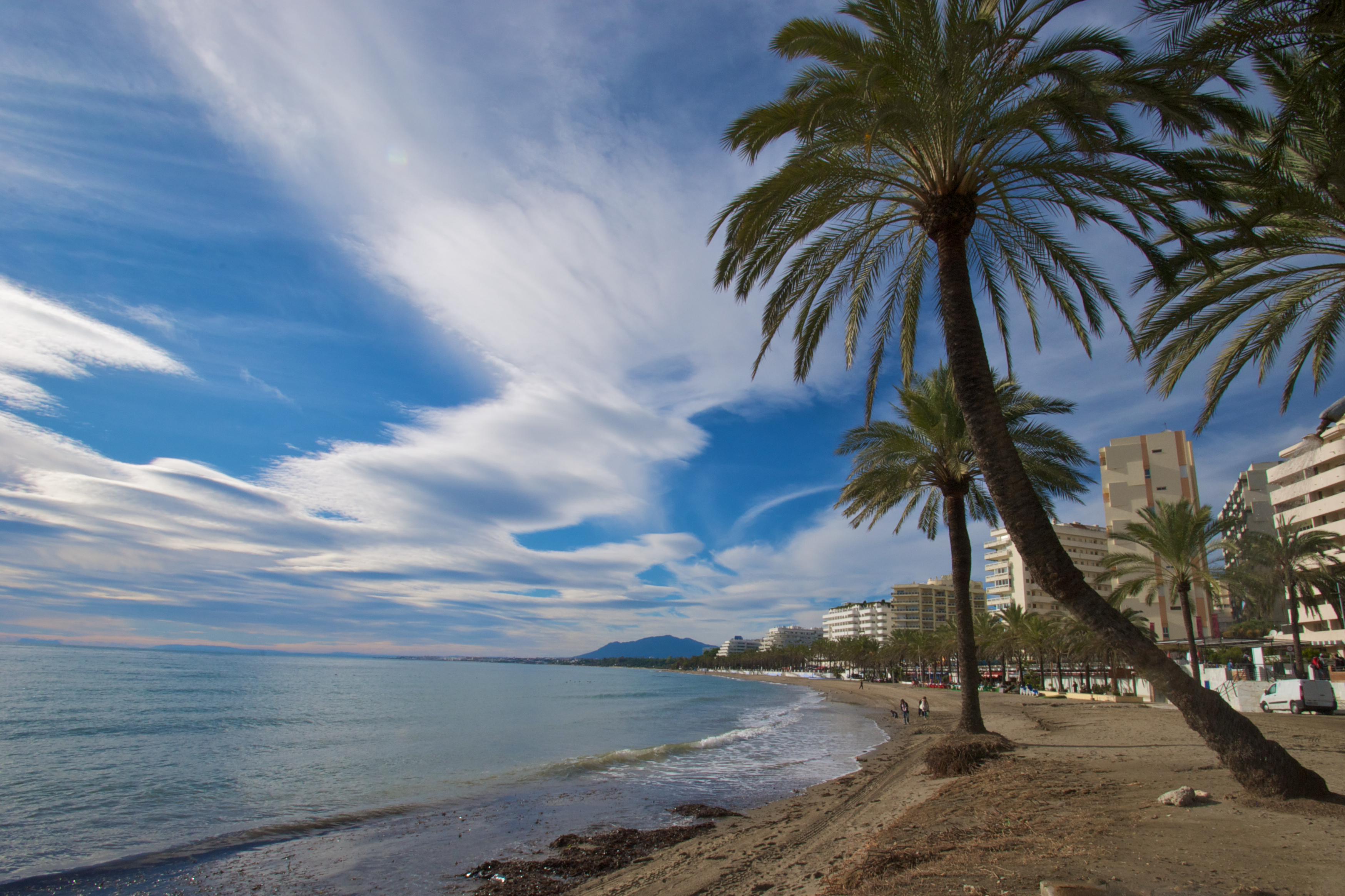 Beach in Marbella Marbella